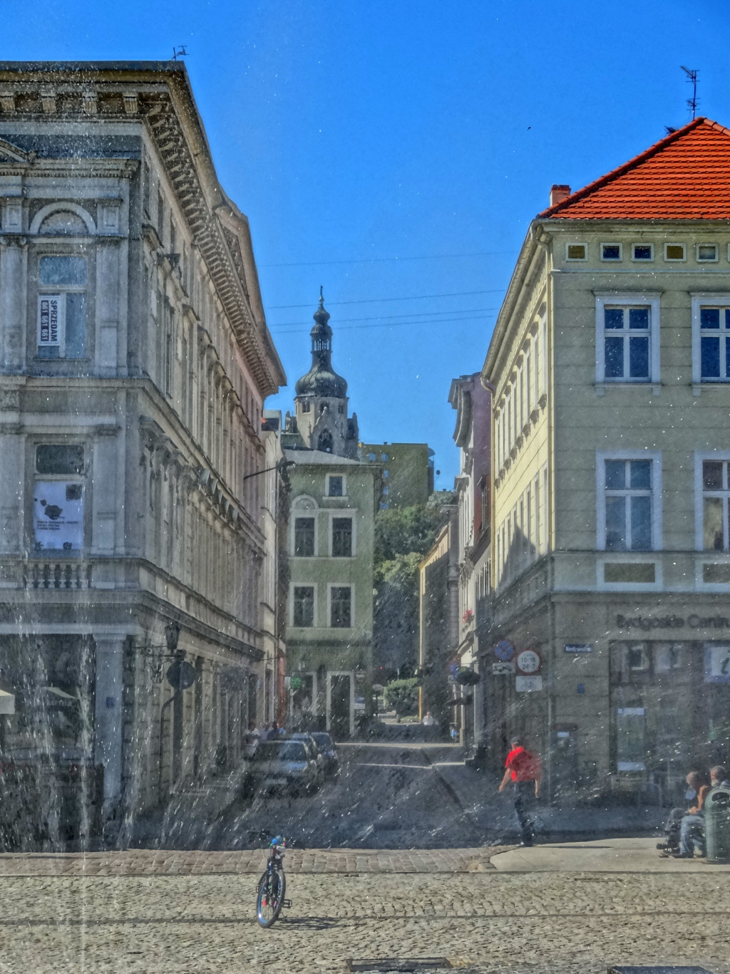 Ulica Stefana Batorego w Bydgoszczy